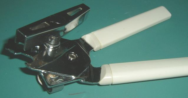 Lizenz